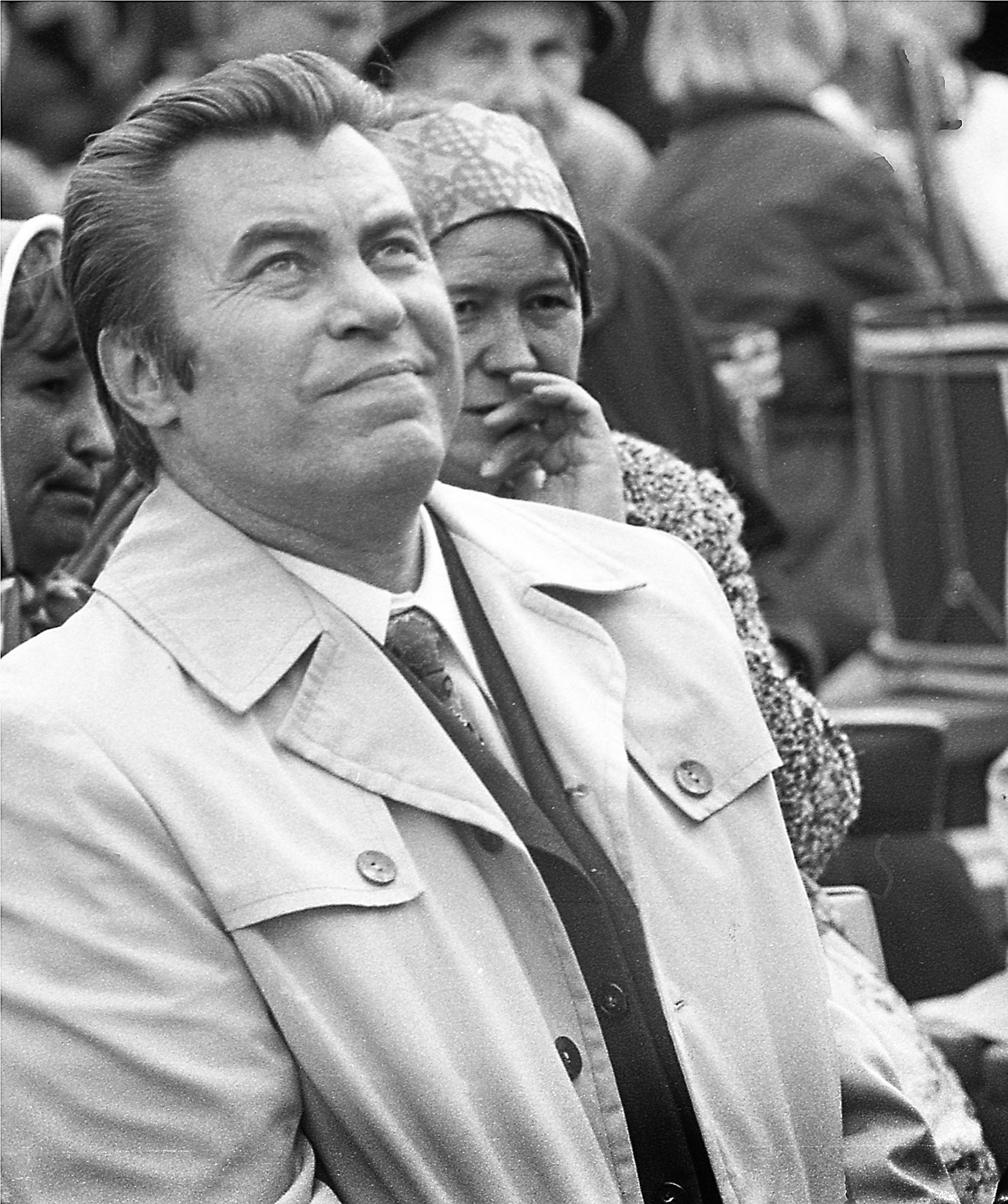 Jüri Pärg